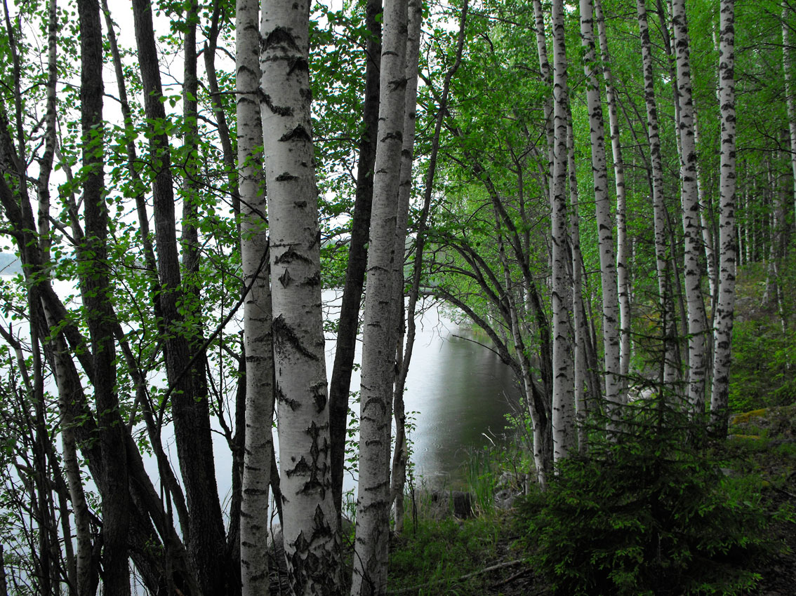 Saimaa, Finland